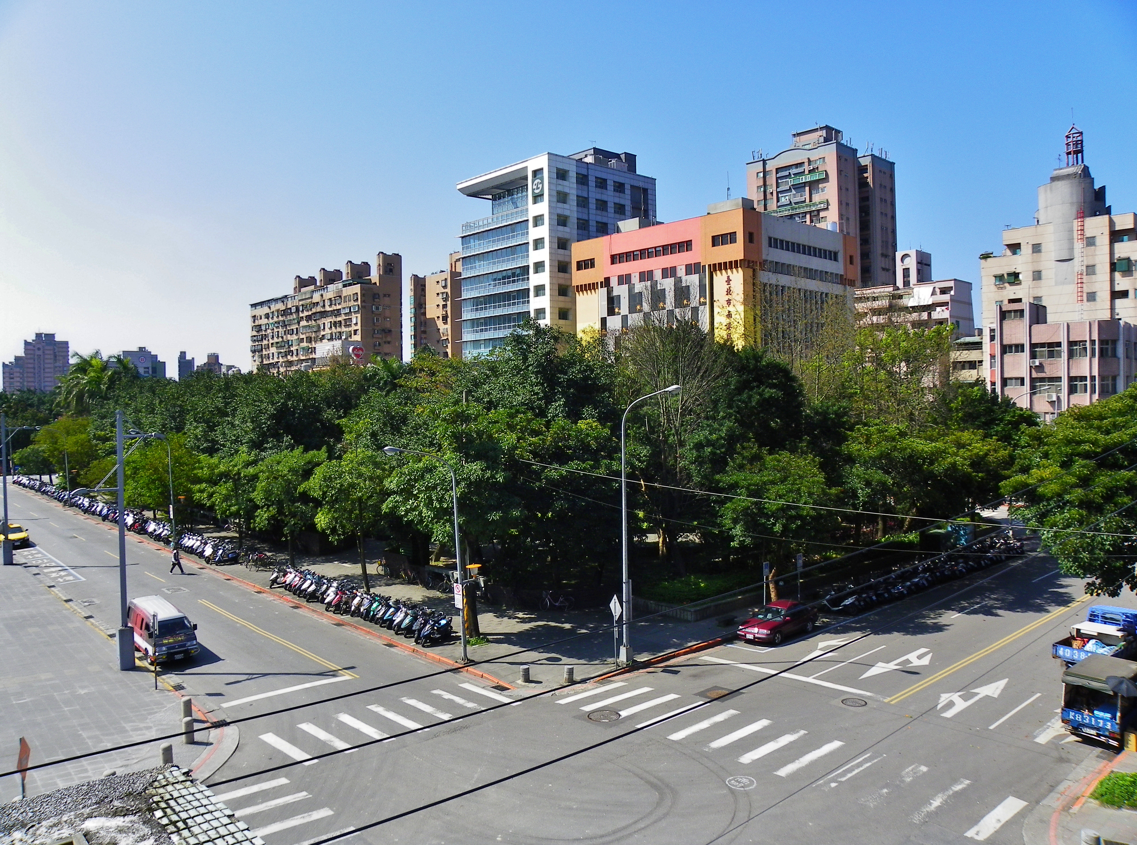 中文（台灣）: 臺北市南港區南興公園東南俯瞰，攝於臺北市立圖書館南港分館。中央建築為臺灣土地銀行南港分行與臺北市南港區行政中心。